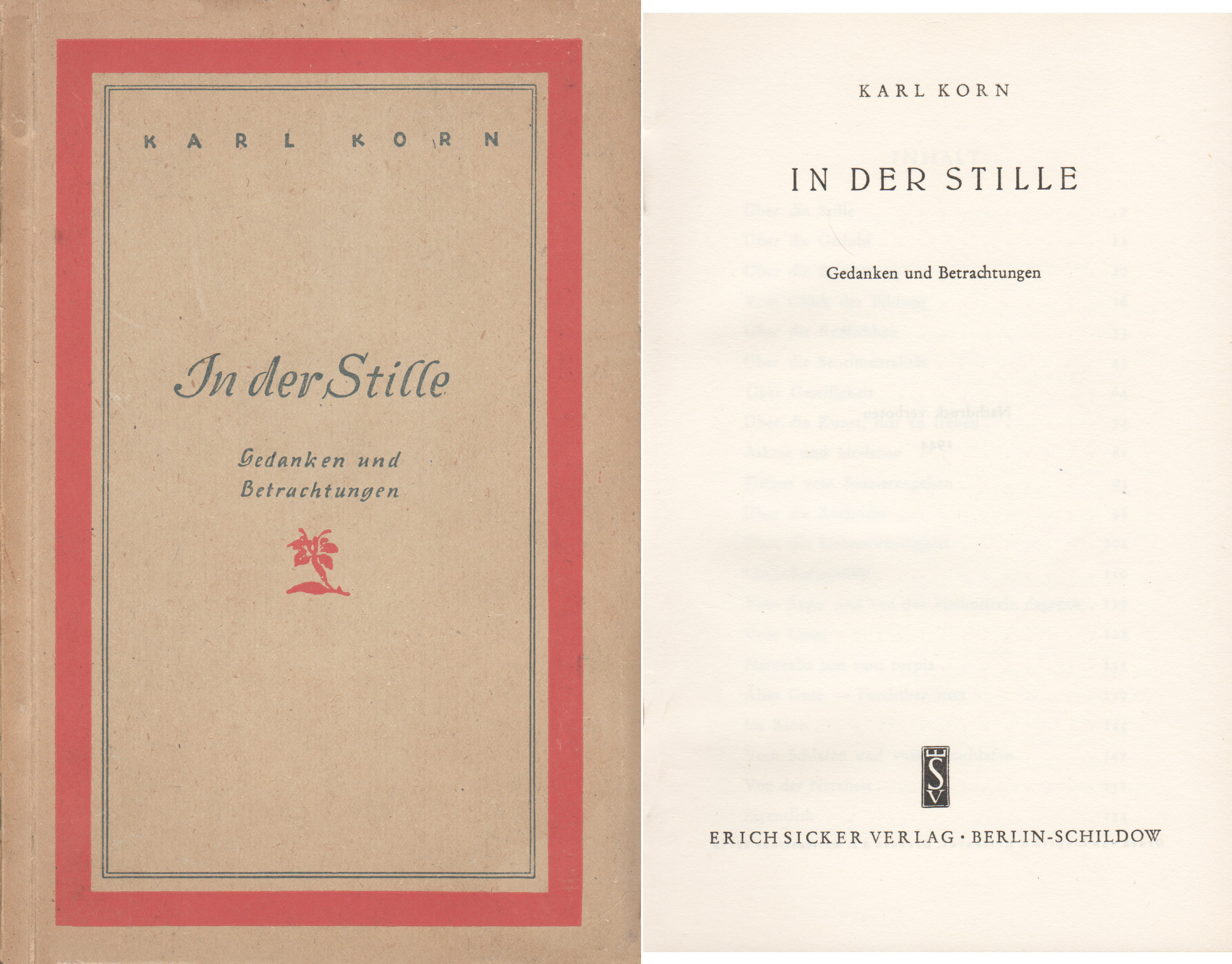 In der Stille mit dem Untertitel Gedanken und Betrachtungen ist eine Darstellung der persönlichen Philosophie des Autors Karl Korn, erschienen 1944 im Erich Sicker Verlag Berlin-Schildow, das Büchlein enthält 158 Textseiten